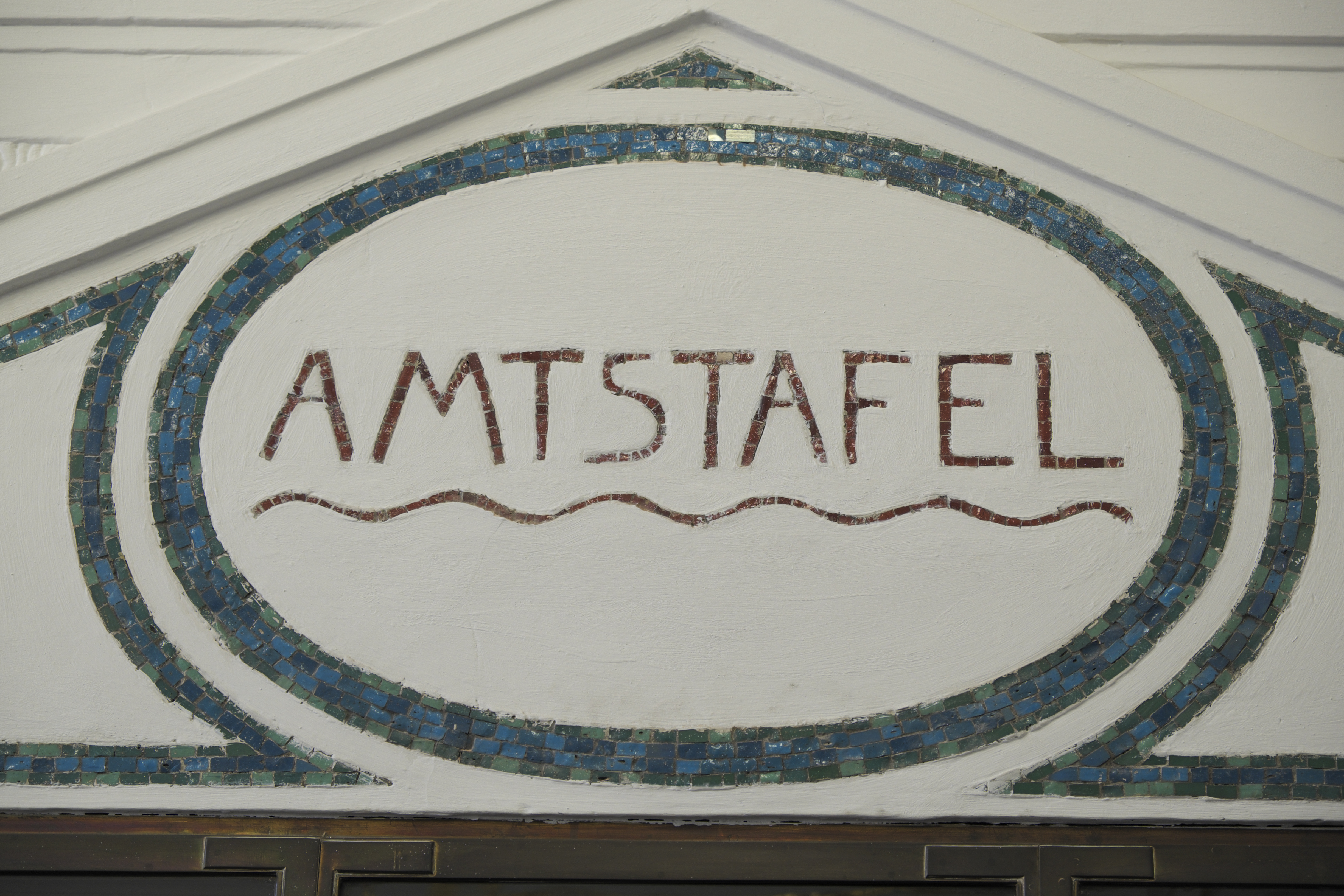 Ehemaliges Hauptzollamt München I in der Landsberger Straße 122–132 im Stadtbezirk Schwanthalerhöhe in München (Bayern/Deutschland), Amtstafel im Eingang der ehemaligen Technischen Prüfungs- und Lehranstalt der Zollverwaltung